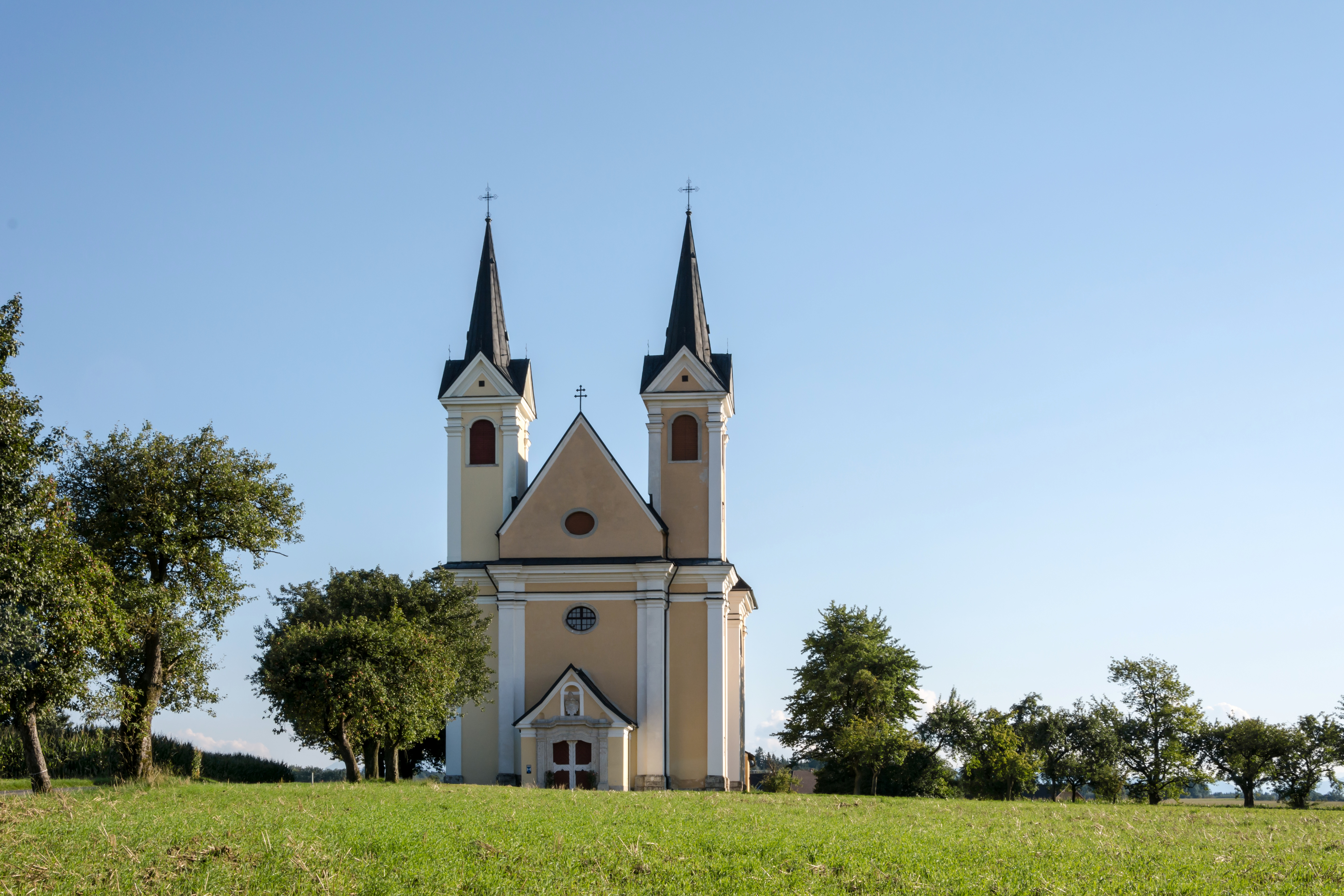 Die Kath. Filialkirche, Wallfahrtskirche Hl. Kreuz von Norden gesehen.